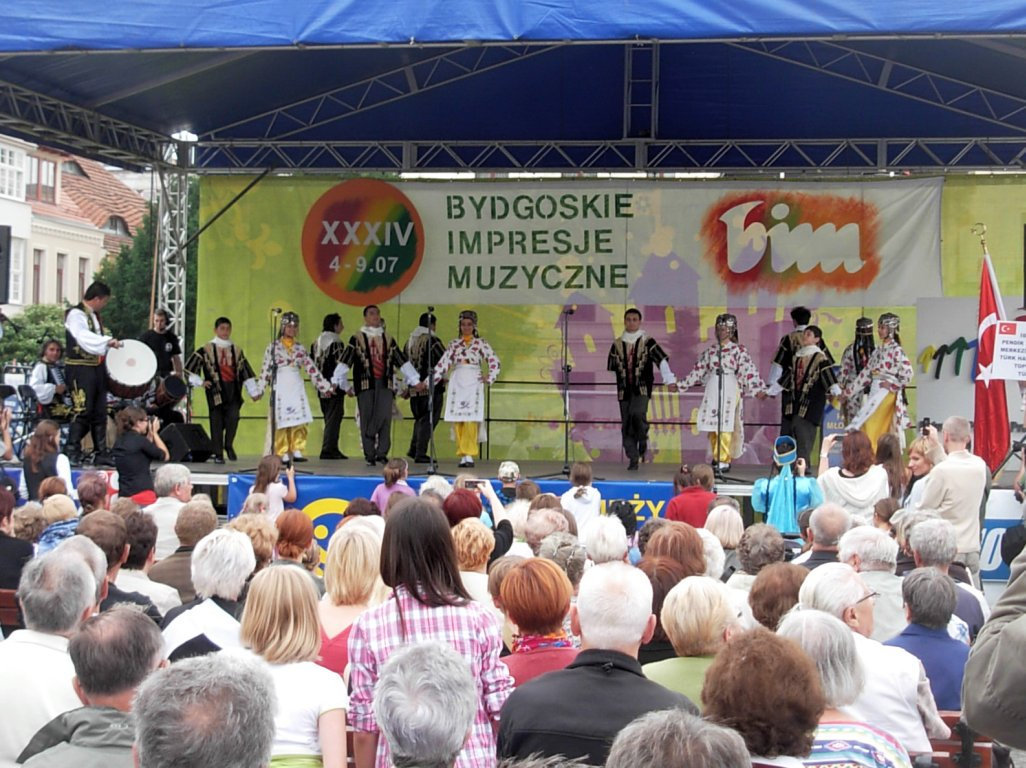 XXXIV Bydgoskie Impresje Muzyczne. Występuje zespół folklorystyczny Ifem ze Stambułu - Turcja